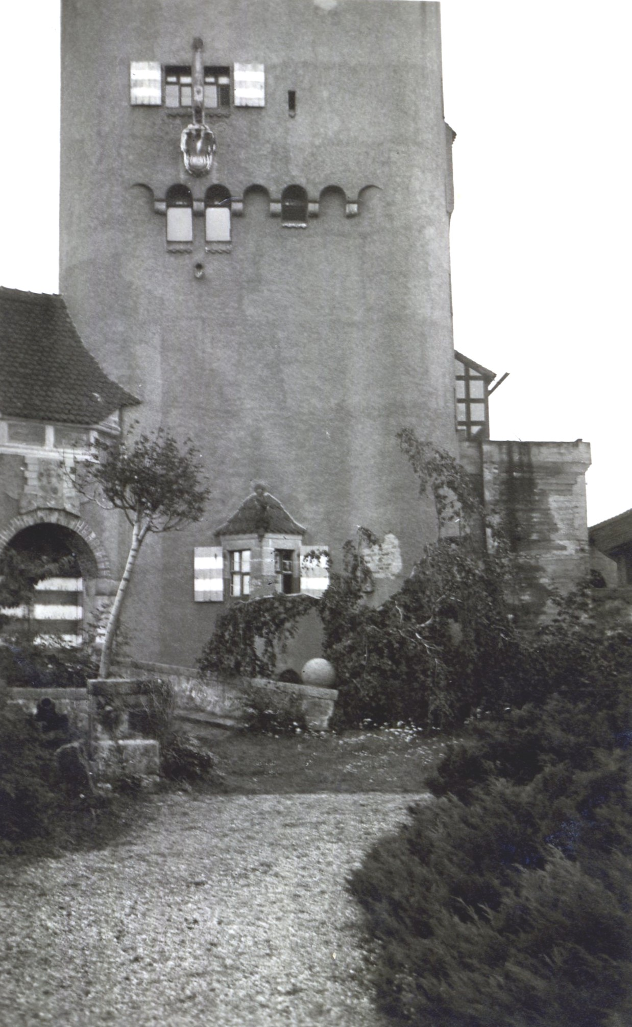 Turm der Roseburg im August 1940